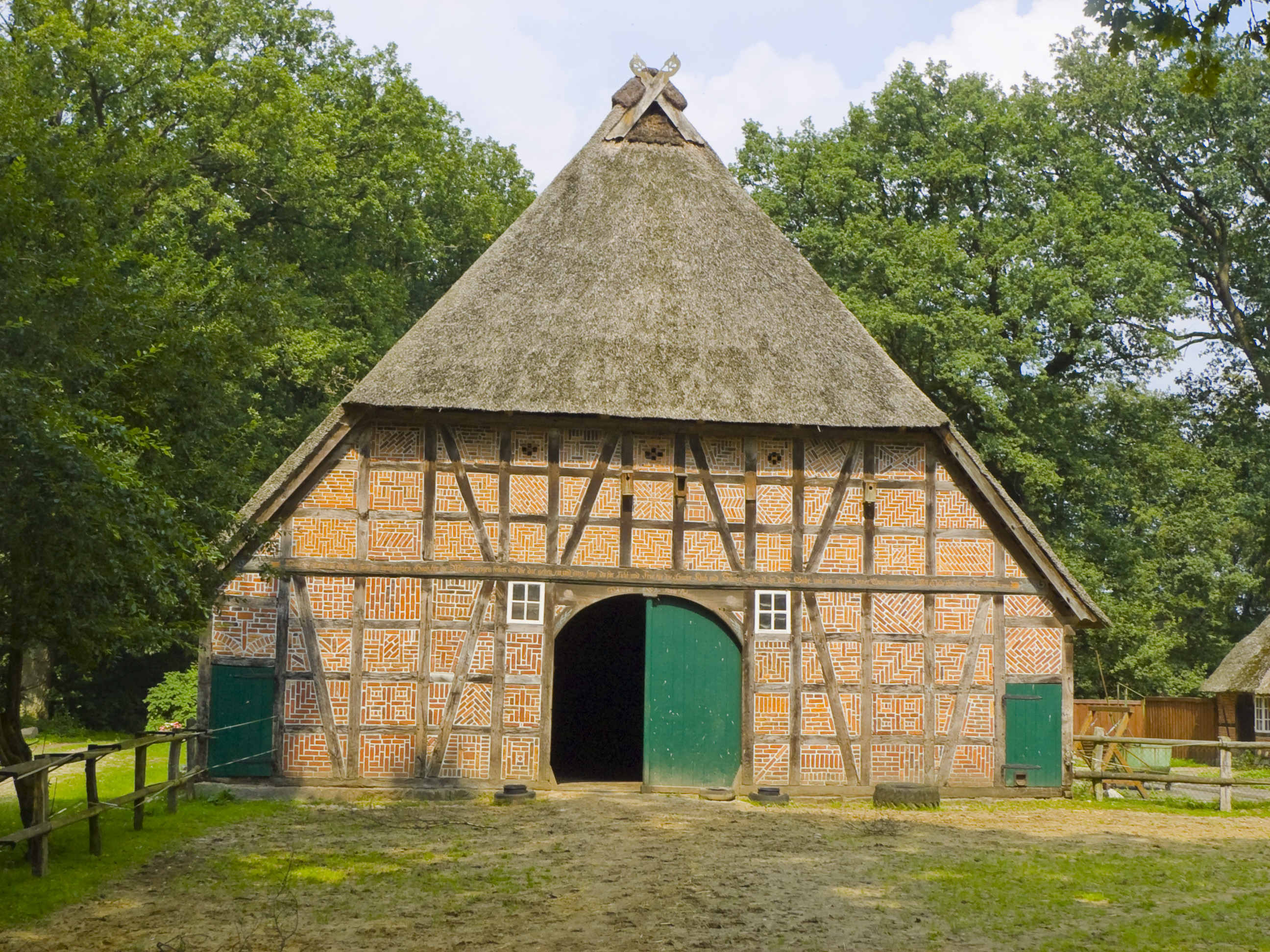 Hof Bockheber bei Schneverdingen